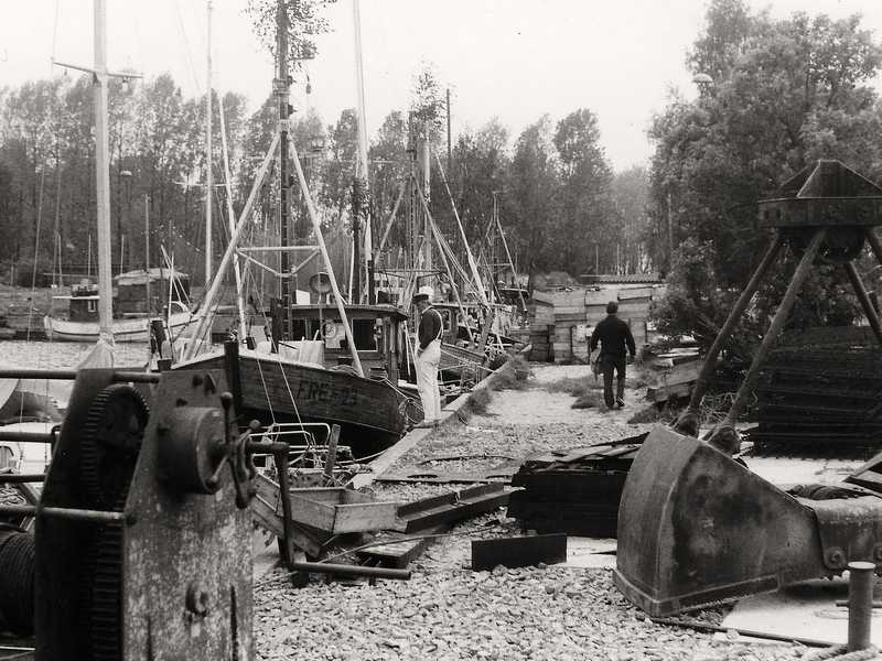 Fischerhafen in Freest um 1985